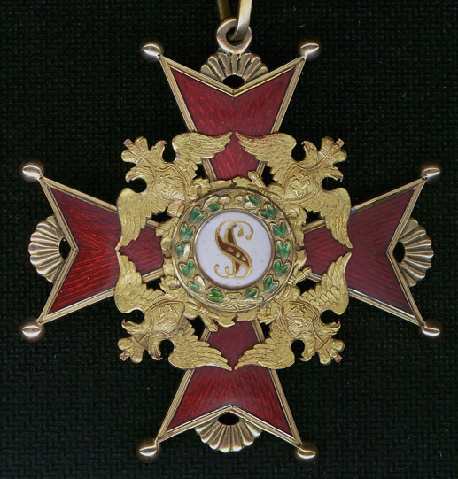 St.Stanislausorden (um 1860)